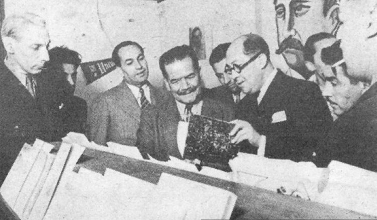 Feria del libro, 1939. Al centro, el presidente chileno Pedro Aguirre Cerda con el escritor Alberto Romero, entonces presidente de la Sociedad de Escritores y gestor de la feria.